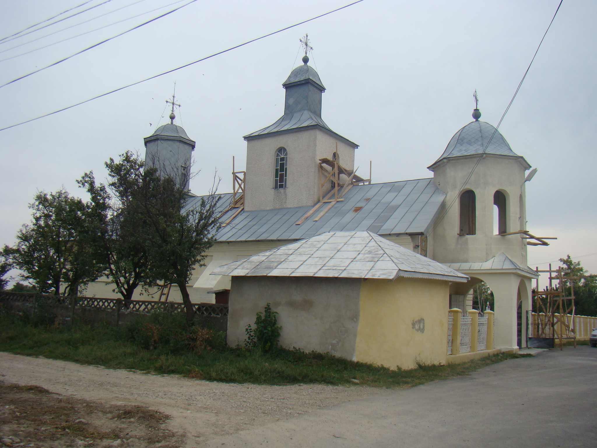 Biserica satului Ramnicelu, Buzau